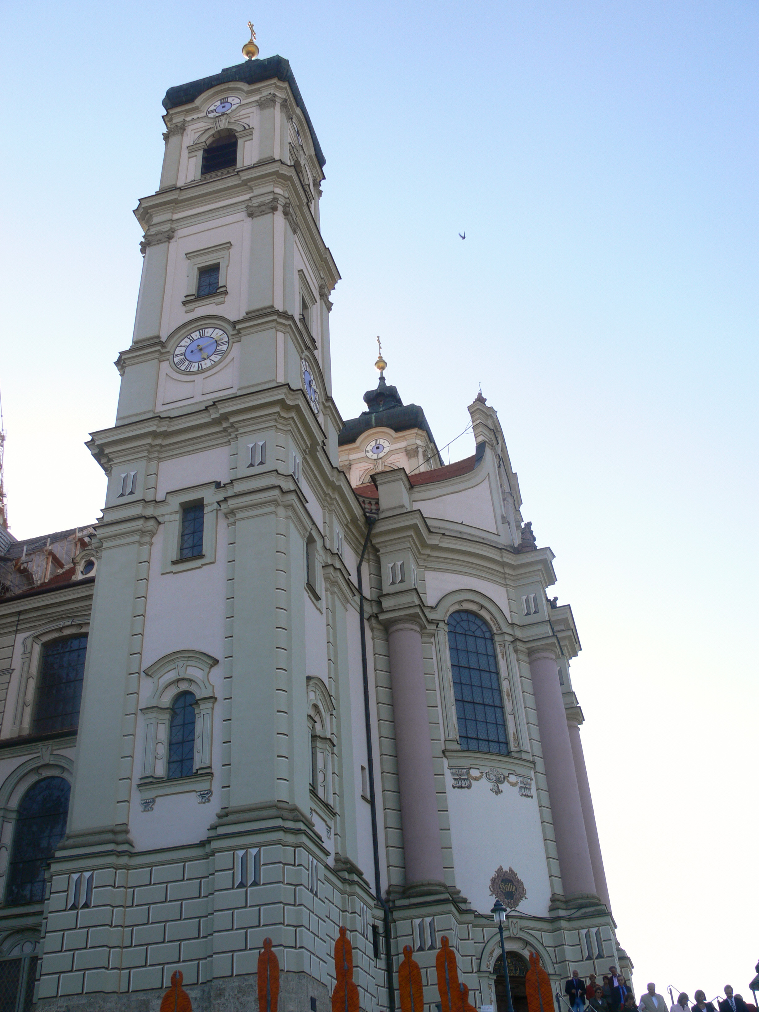 Ottobeuren, Basilika St. Alexander und Theodor: Ostturm und Fassade